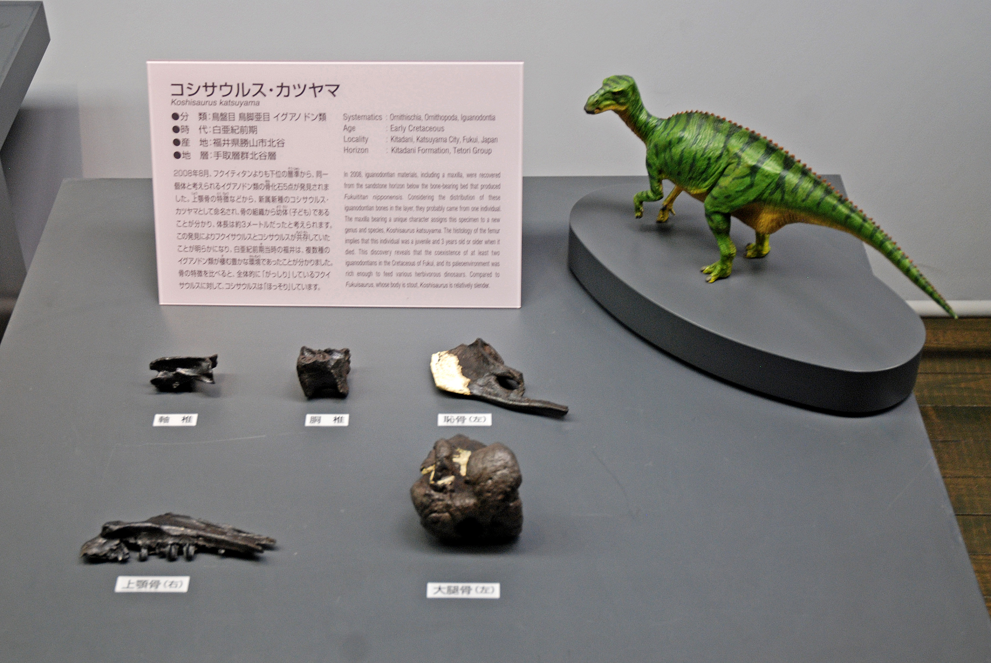 コシサウルスの化石